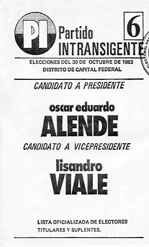 Boleta electoral de las Elecciones de Argentina de 1983 con la fórmula Alende-Viale